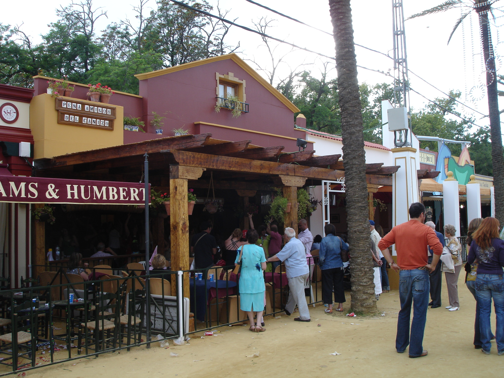 Case de la Feria del Caballo deJerez de la Frontera